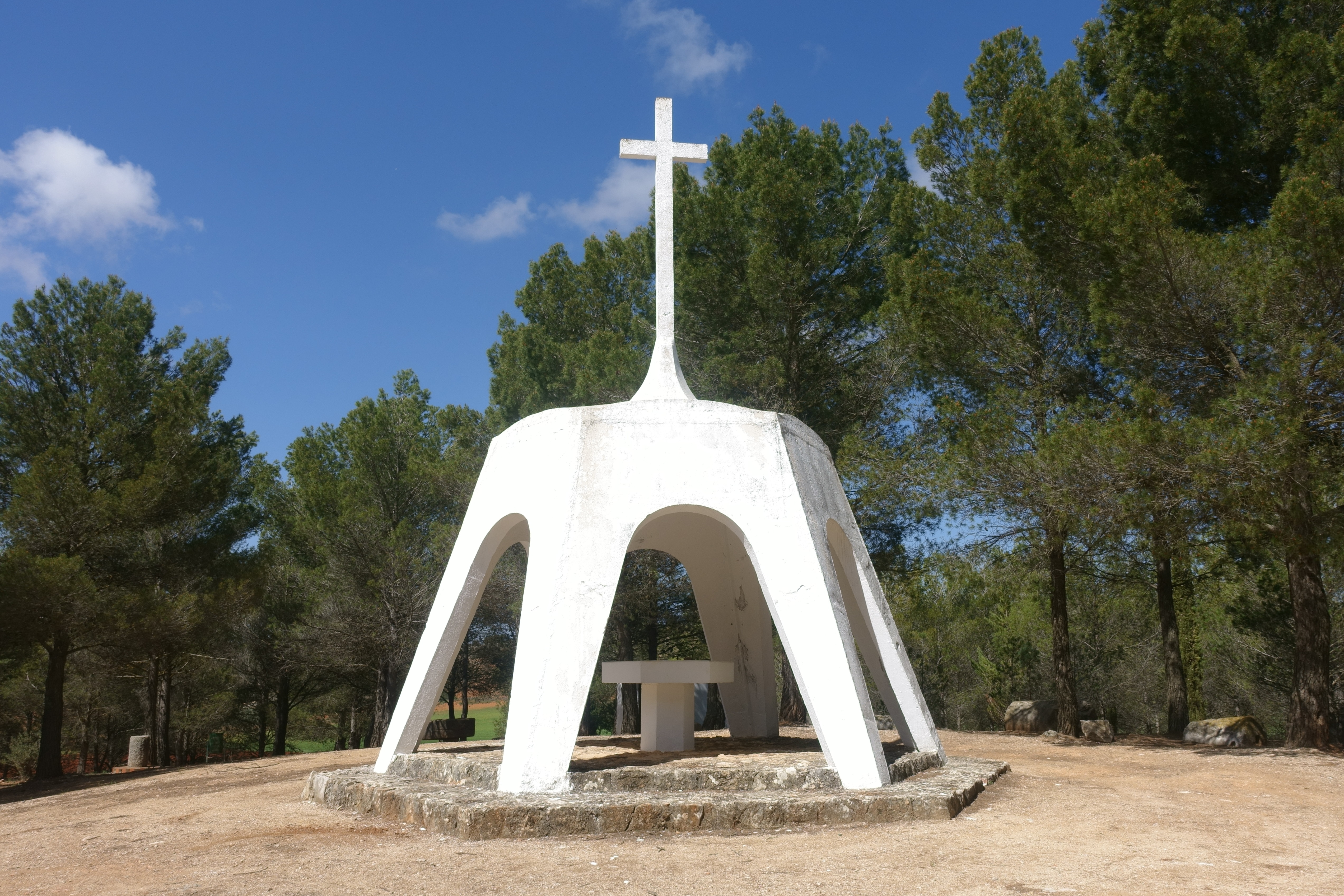 Ermita de San Antón, en Los Hinojosos (Cuenca, España).